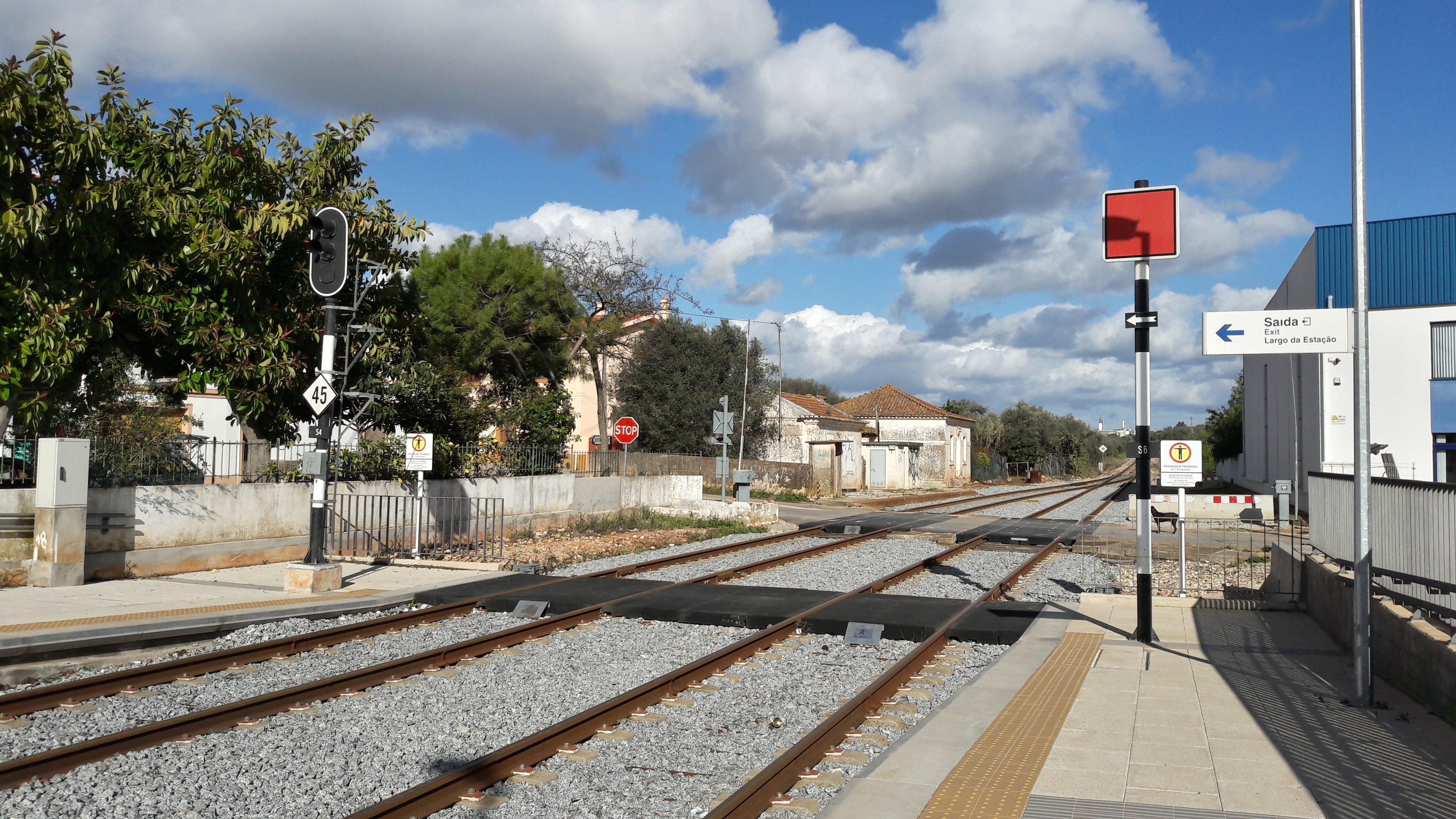 Gare de Silves - passagem de nível. 03/2018.